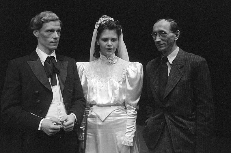 Original image description from the Deutsche Fotothek Szenenbilder